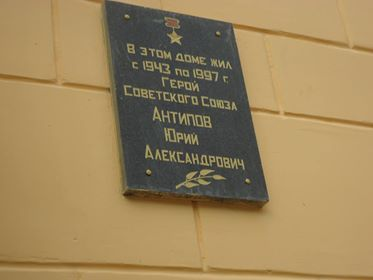 Памятная доска на здании, где жил Антипов Юрий Александрович (1915-1997)